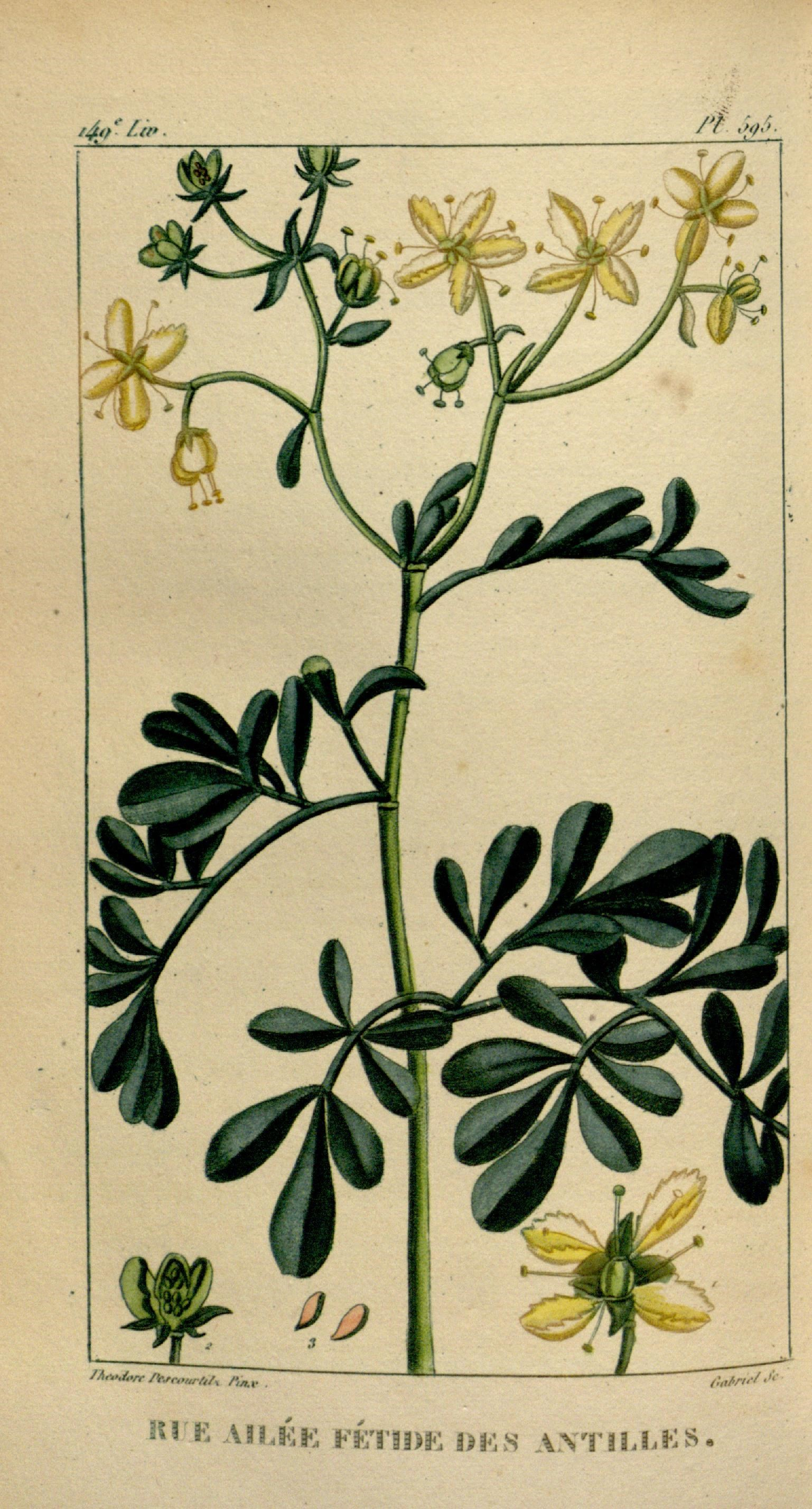 Rue d'Orient et des Antilles ou Ruta chalepensis L.